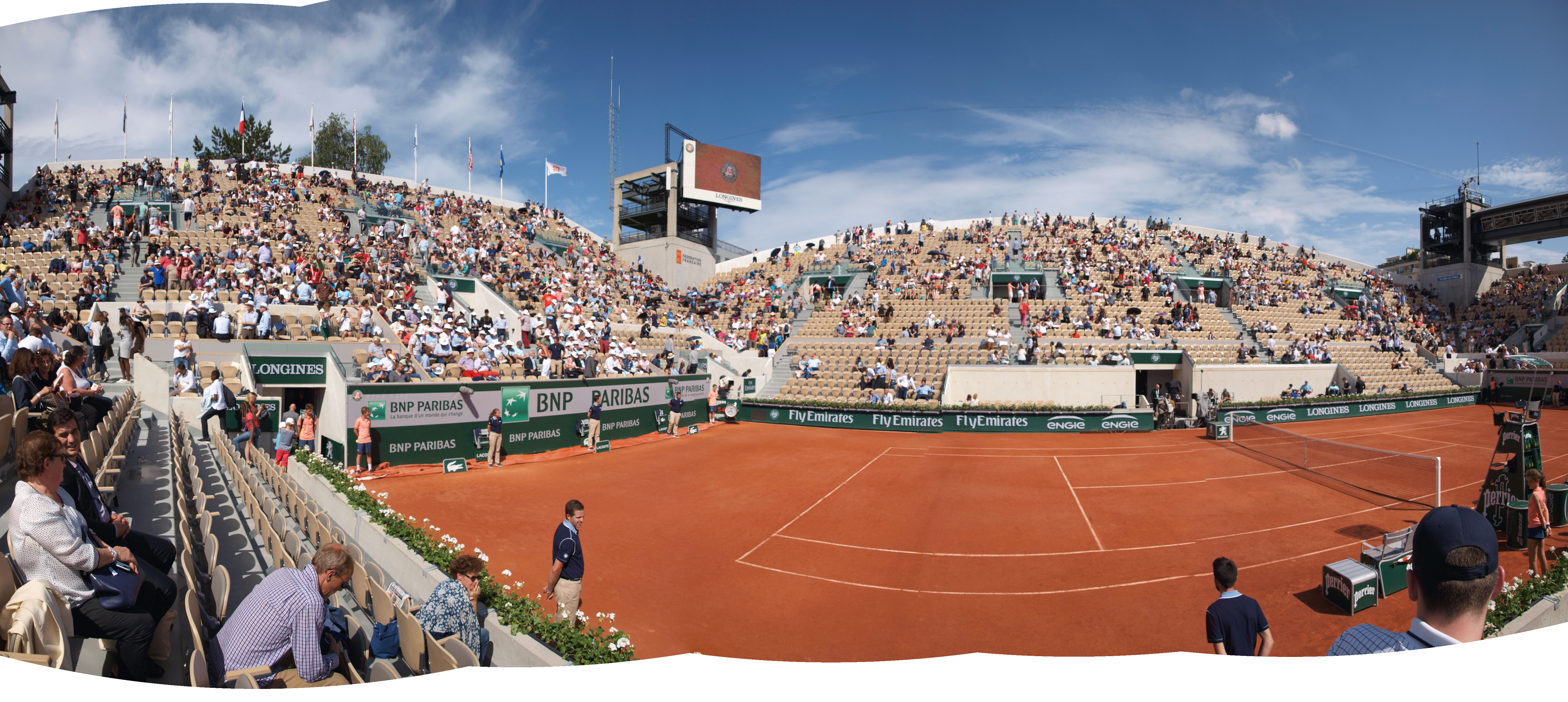 Vue panoramique du court Lenglen entre deux matchs , le 29 mai 2018